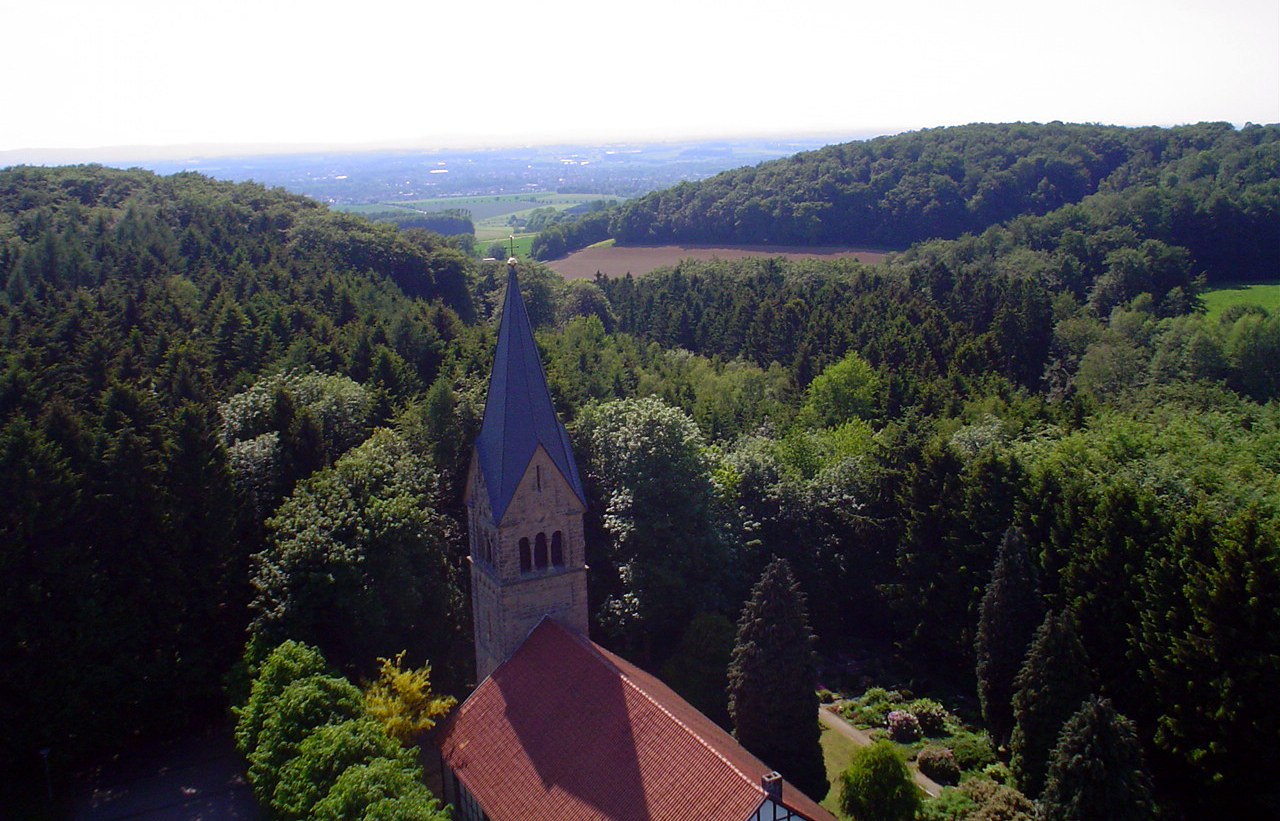 Aufgenommen indem die Kamera mit Hilfe eines Drachens über die Kirche gehoben wurde. Beispiel für "Kite Aerial Photography". Ort: D-32108 Bad Salzuflen, Ortsteil Bergkirchen. vom Urheber hochgeladen --Crux 14:27, 26. Dez 2005 (CET)